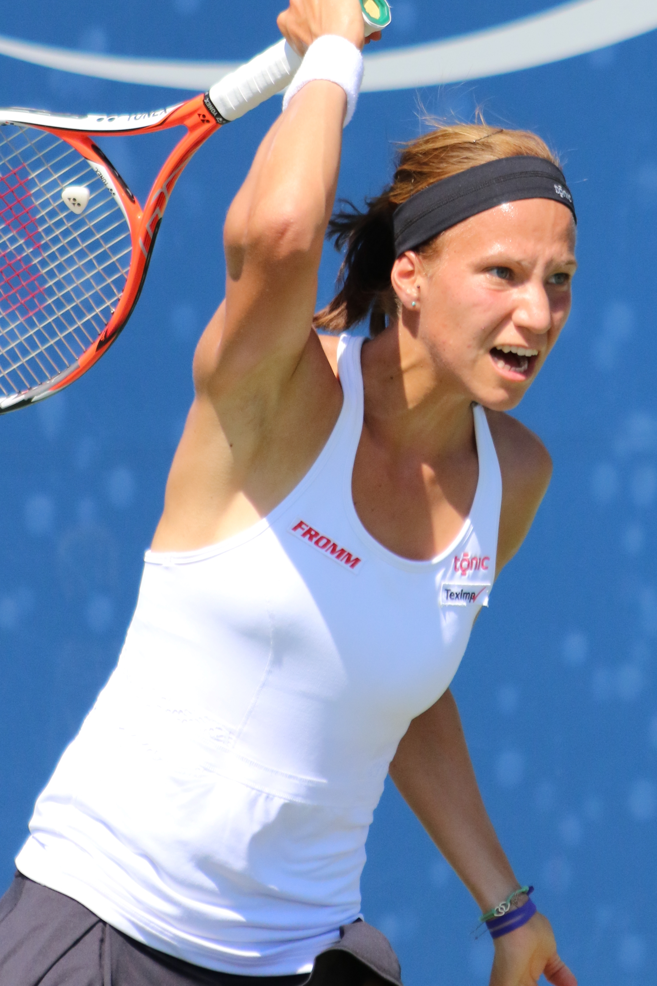 Golubic US16 (32)